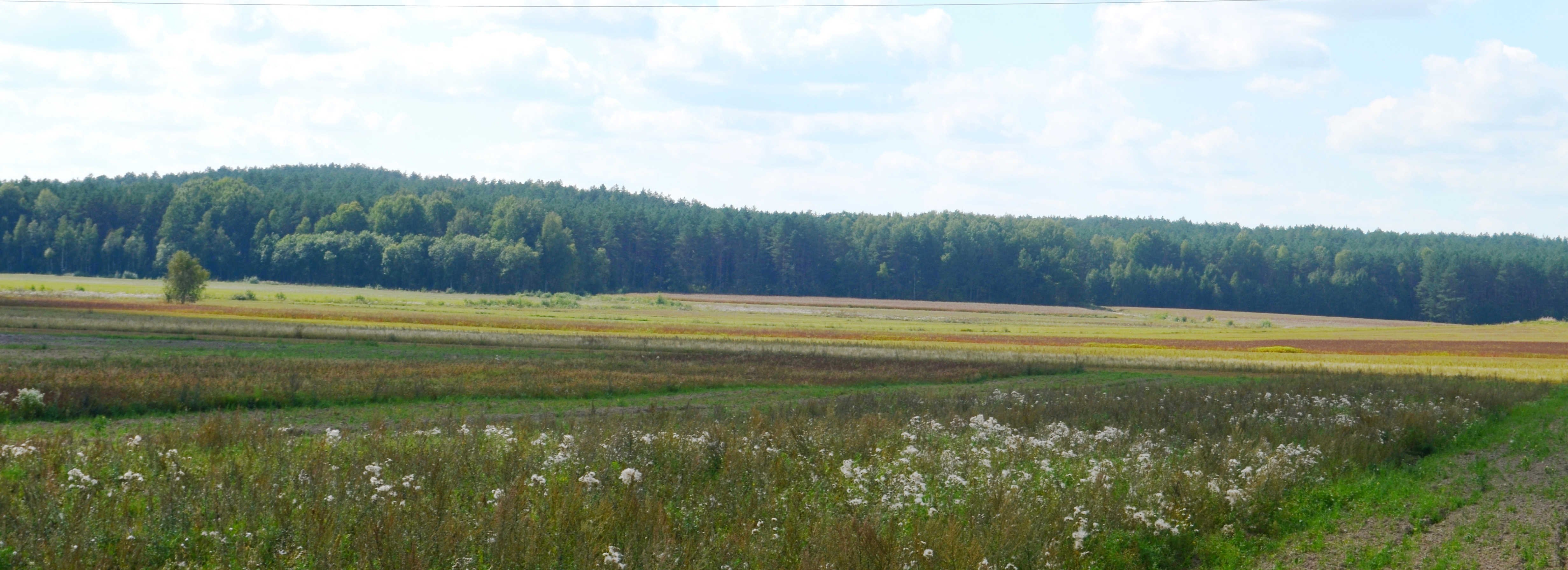 Zajašiškių miškas nuo Bėčionių, Šalčininkų raj.